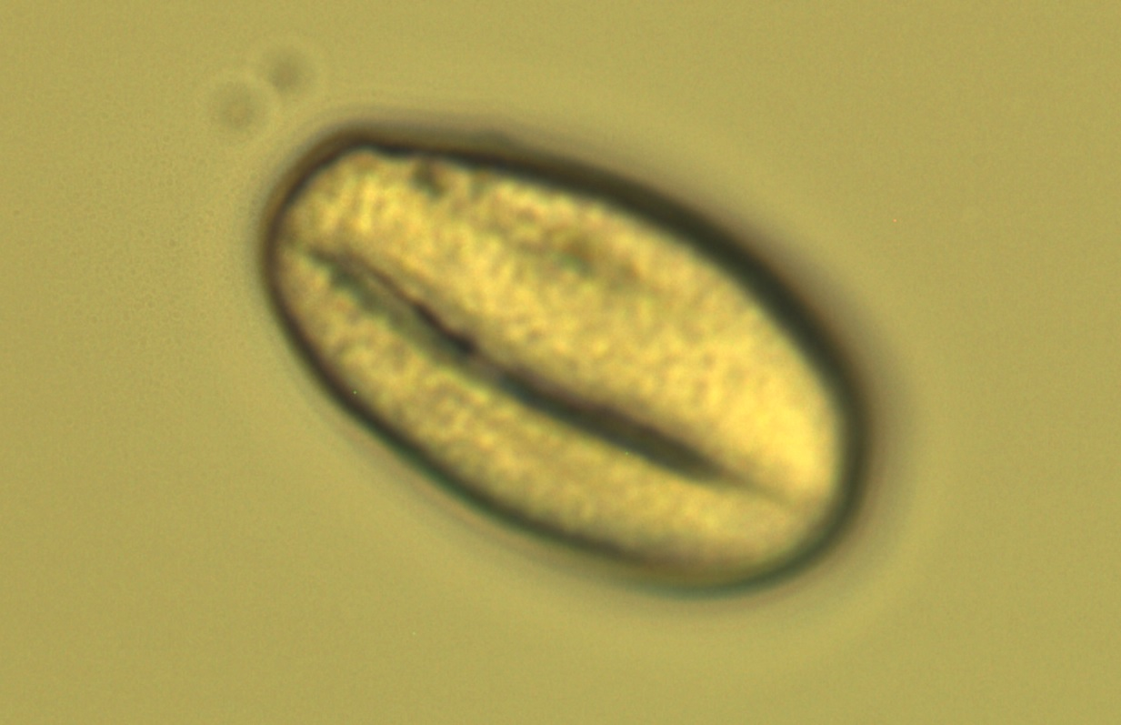 Anemone blanda Pollenkorn 400x